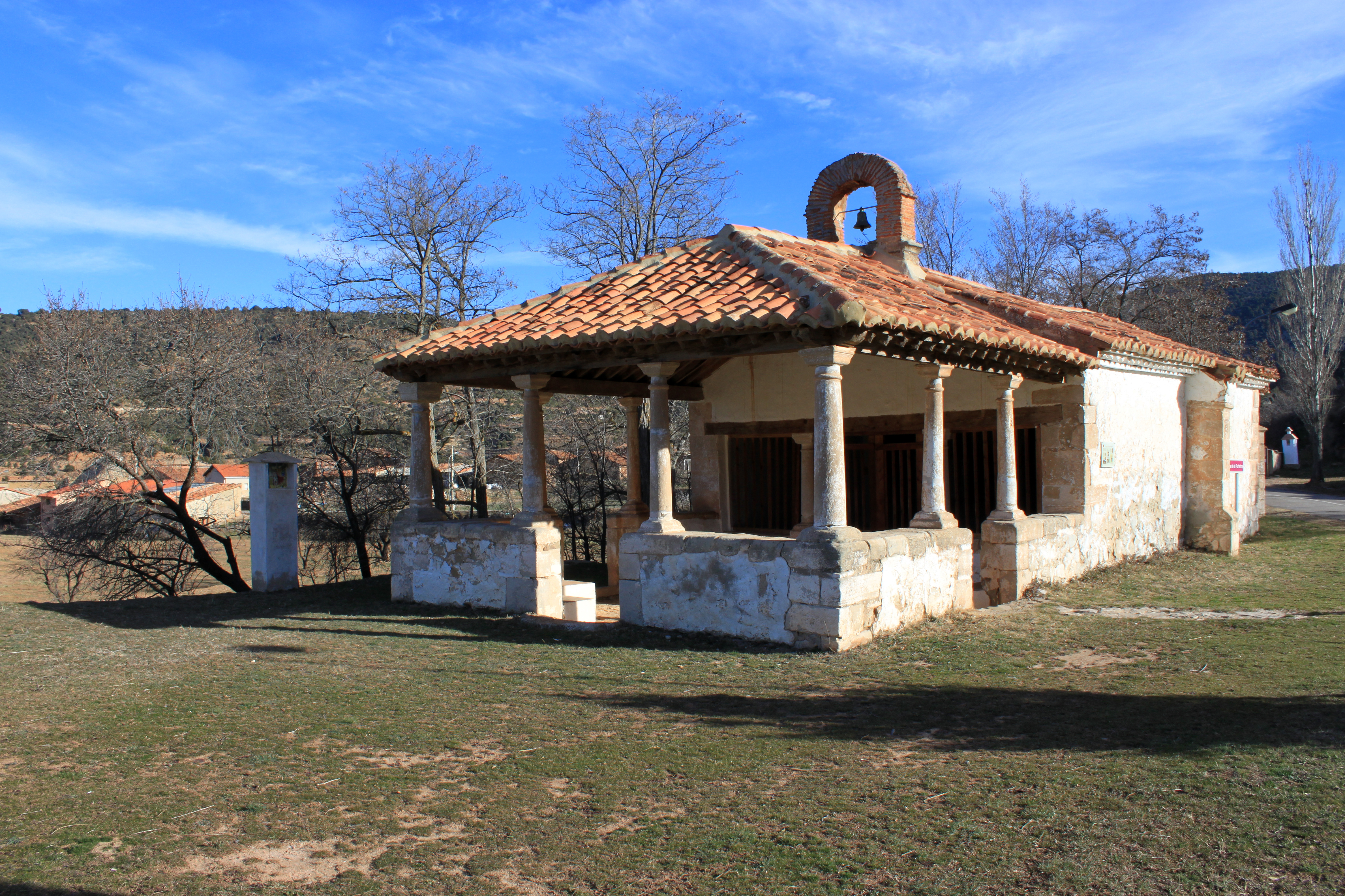 Ermita de la Purísima de Puebla de San Miguel, provincia de Valencia, Comunidad valenciana, España. 09.201-003.